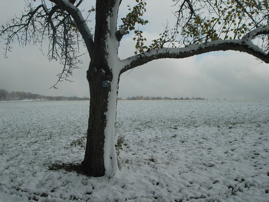 El Camino de Santiago a su llegada a Tubinga abandona Schönbuch, esta imagen se corresponde a la primera señal tras dejar el bosque en las afueras de Tubinga.